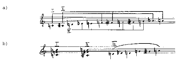 Kahe kvartakordi selekteerimine näites 1.1 toodud kaksteisthelireast: a) kahe kvartakordi I ja II ning astmelise materjali III selekteerimine kaksteisthelireast, b) selektsiooni tulemusena saadud kaks kvartakordi ning astmeline liikumine. Kvartakorde võiks kasutada seriaalse muusikalise lõigu harmoonia ning kvartakordidest üle jäänud rea helisid ülemise hääle meloodia loomisel. Teistsugust laadi muusikalise materjali keskel äratab selline muusikaline lõik tähelepanu